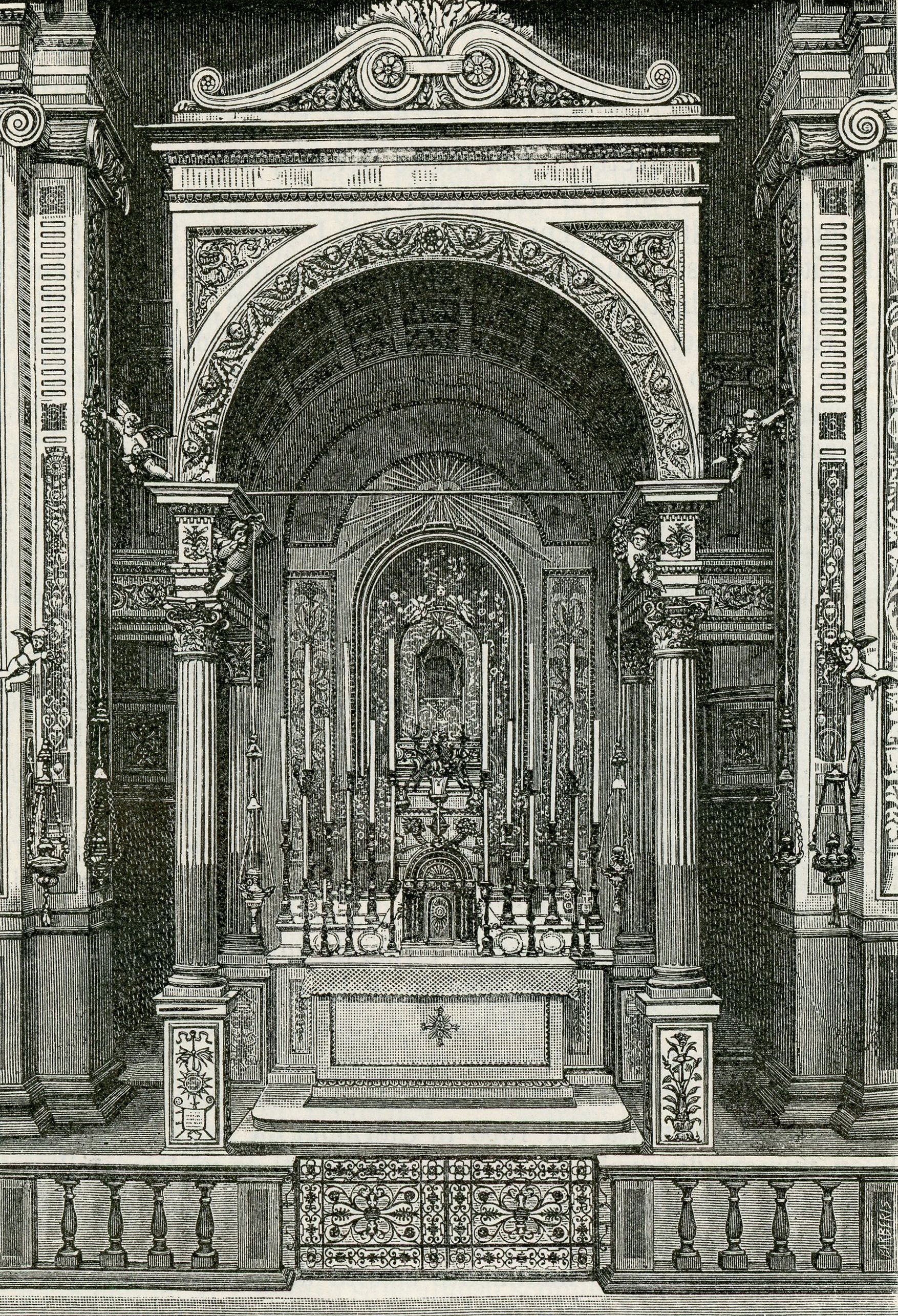 Imola (dintorni): interno del Santuario della madonna del Piratello (xilografia di Giuseppe Barberis).